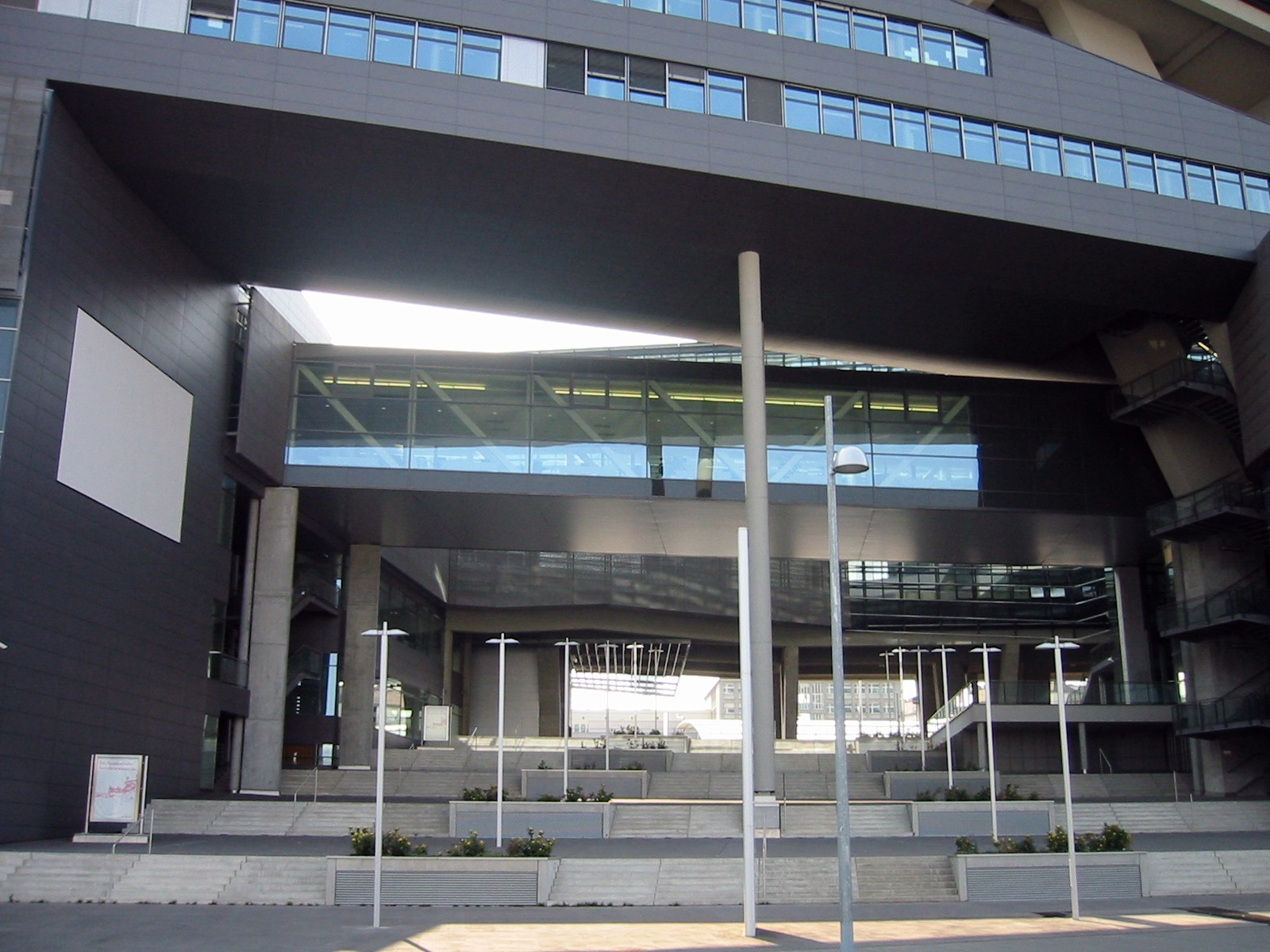 T-Center in Wien, Durchgang